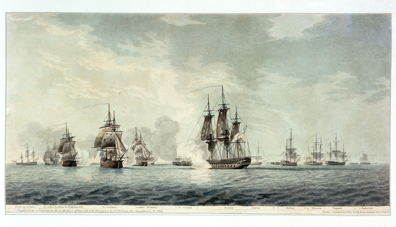 Bataille du Nil. Au premier plan, le HMS Zealous combatant le Généreux